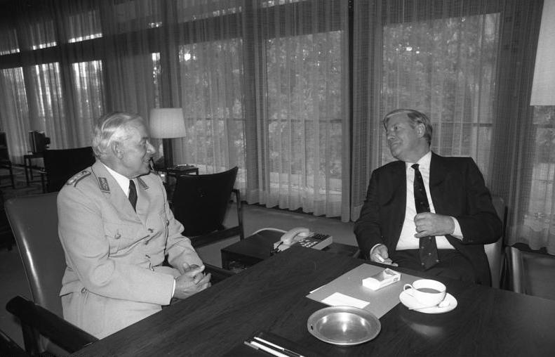 Bundeskanzler Helmut Schmidt empfängt den Inspekteur des Heeres, Generalleutnant Hans Pöppel im Bundeskanzleramt.